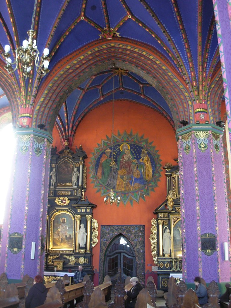 Katedra w Bydgoszczy. Modernistyczna polichromia wykonana w latach 1922-1925 przez Henryka Jackowskiego wg projektu Stefana Cybichowskiego.